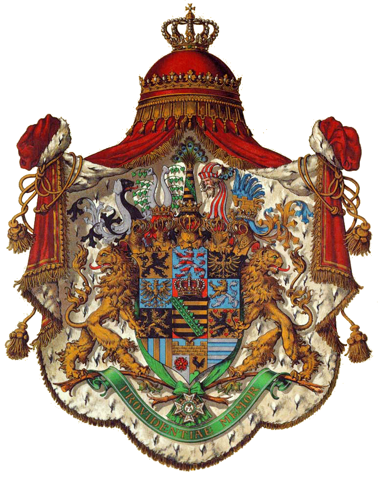 Das große Wappen des Königreichs Sachsen im Deutschen Reich